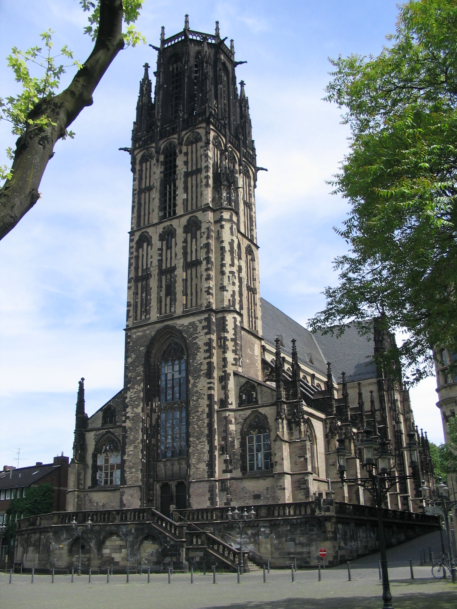 Turmseite der Salvatorkirche in Duisburg